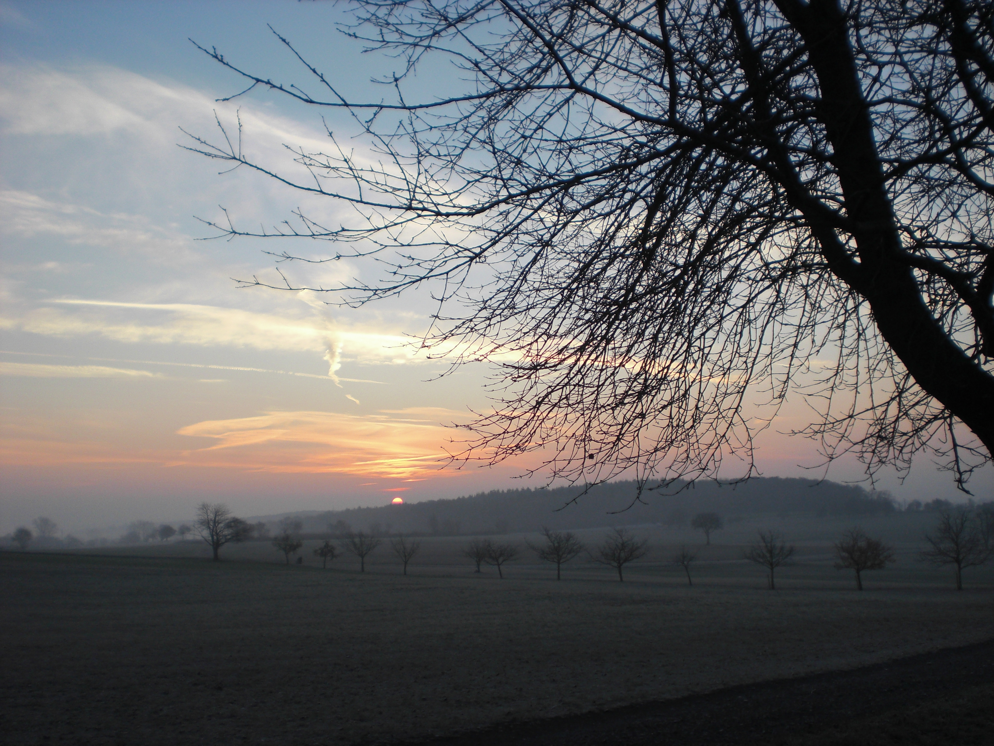 Blick über die Bauschlotter Platte vom Eisinger Loch zum Neulinger Wald in Richtung Ost-Südost.